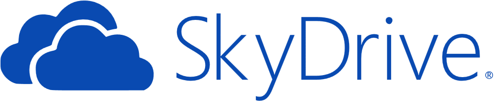 SkyDrive logo sinds 2012